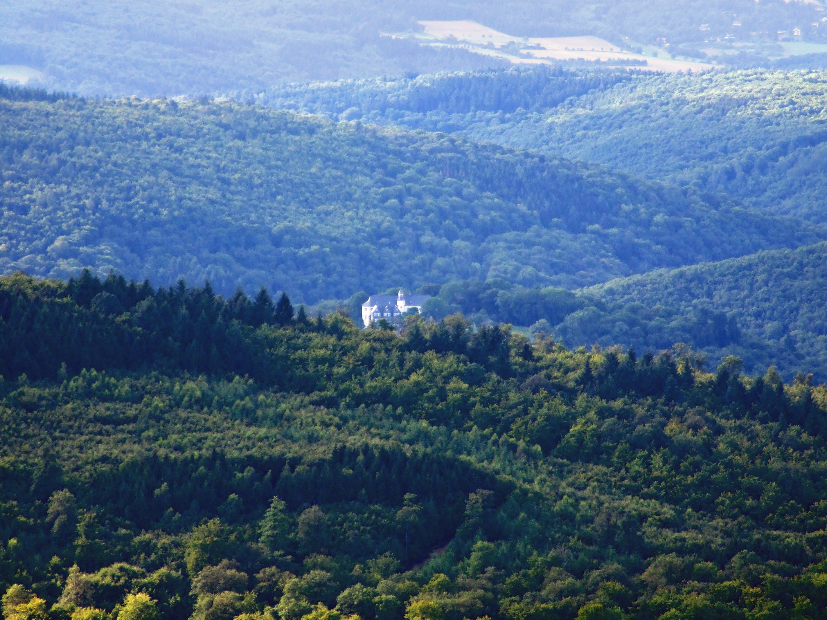 Schloss Neuweilnau, Weilrod, Hintertaunus, Hessen, Deutschland war u.a. Geburtsort von Philipp III. (Nassau-Weilburg) (1504-1559), dem Erbauer der Residenz Weilburg. Es wurde von einem seiner Söhne, Philipp IV. (Nassau-Weilburg) (1542-1602), von 1564-1566 als Residenz ausgebaut, bevor dieser 1571 seine Residenz von Neuweilnau nach Saarbrücken wegen eines Erbfalls verlegte.